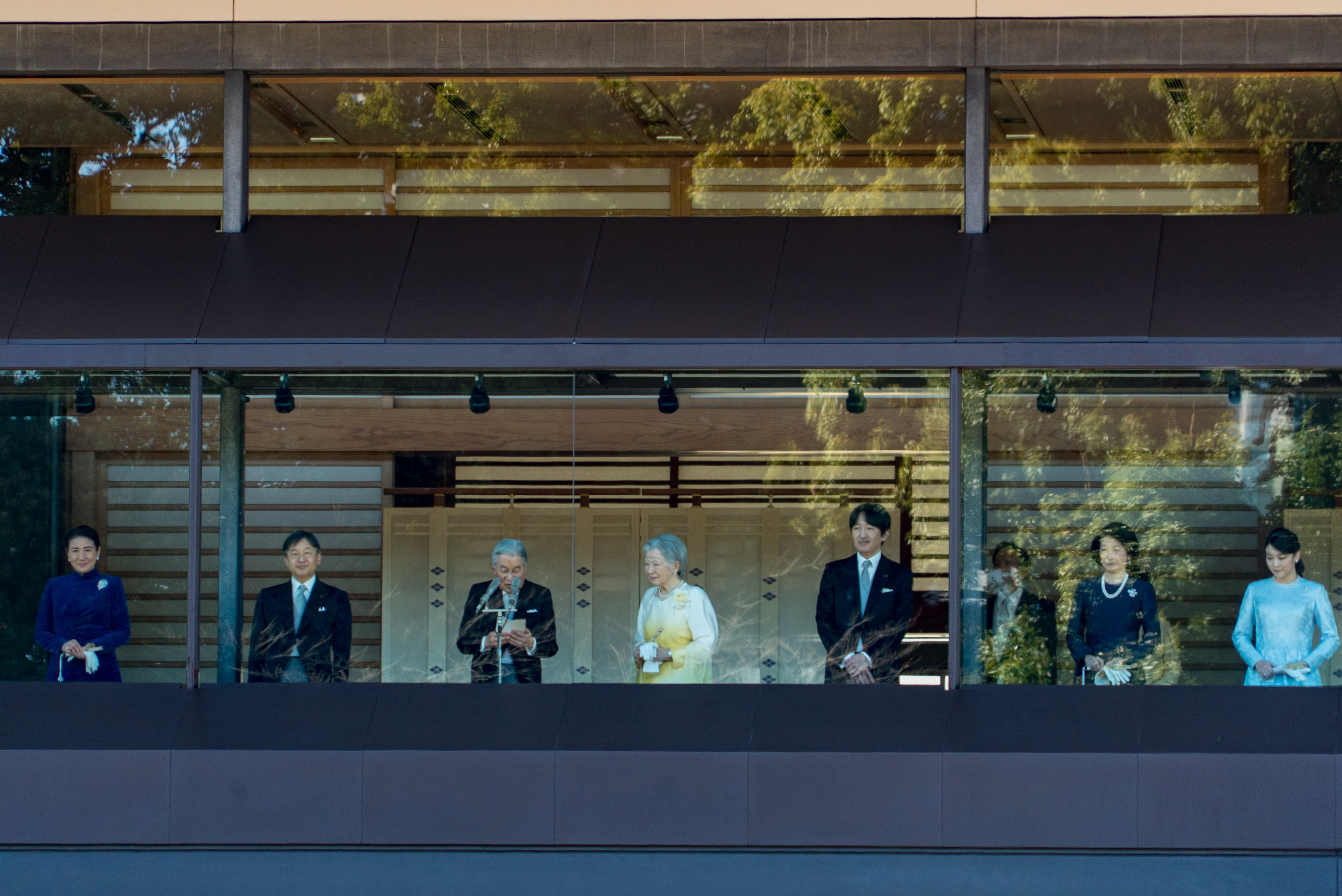 新年一般参賀2018-13.jpg